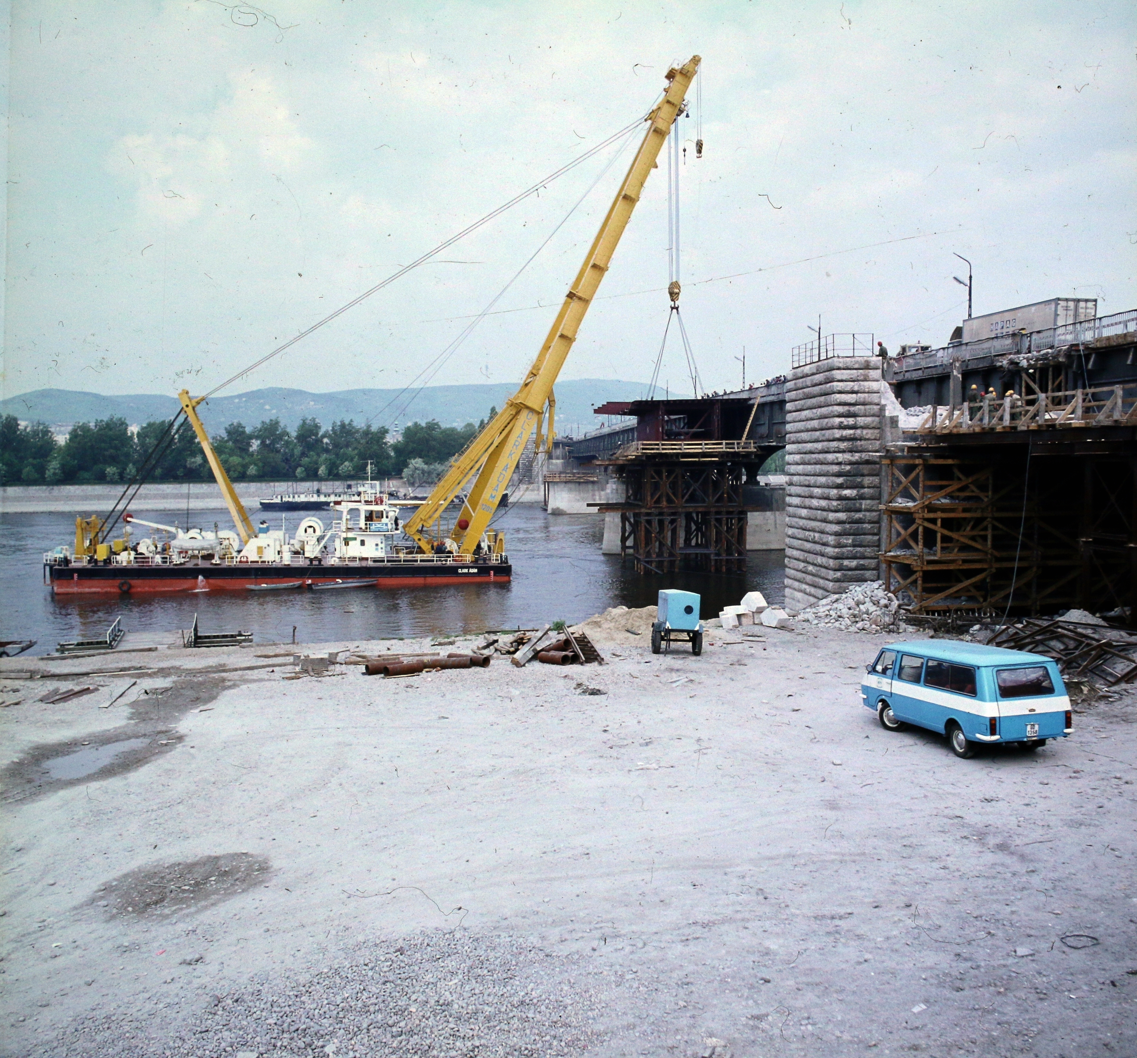 az Árpád híd szélesítési munkálatai a pesti hídfőtől a Margit-sziget felé nézve. Location: Hungary, Budapest XIII. Tags: colorful, dredge, minivan, bridge building, RAF-brand, Budapest Title: az Árpád híd szélesítési munkálatai a pesti hídfőtől a Margit-sziget felé nézve.